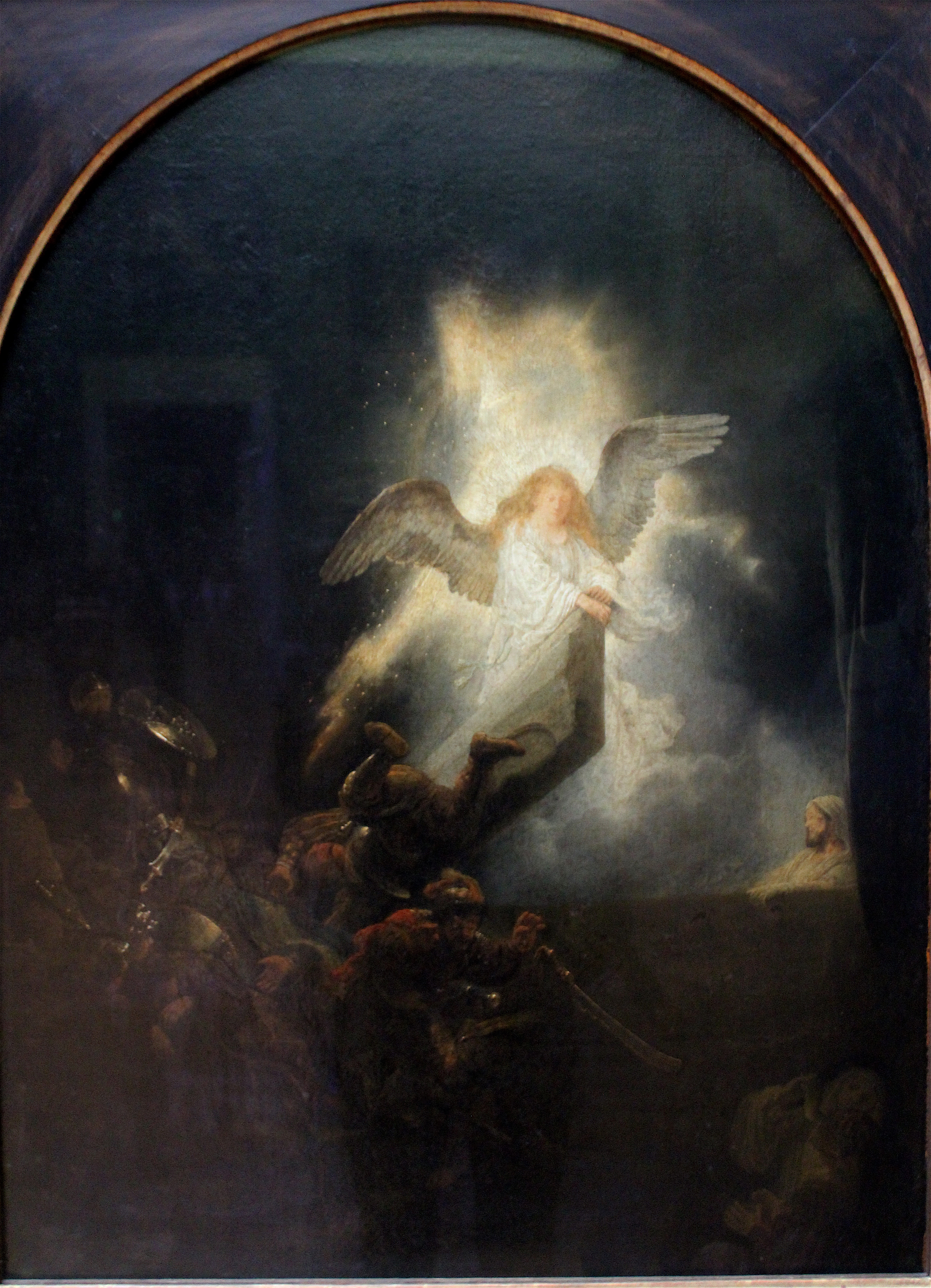 Rembrandt. Resurrección de Cristo. Munich, Alte Pinakothek.